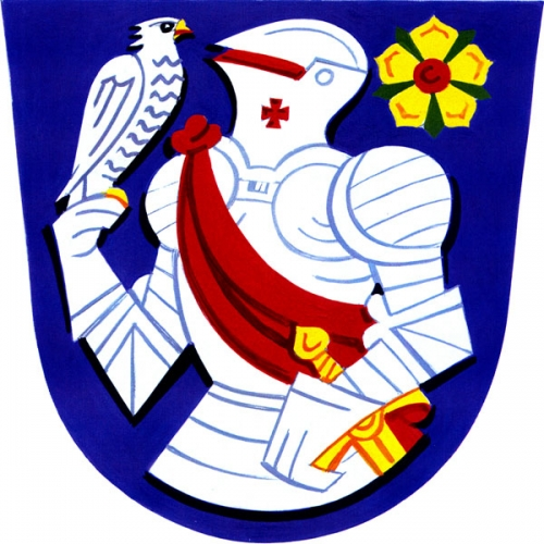 Znak, Linhartice, okres Svitavy